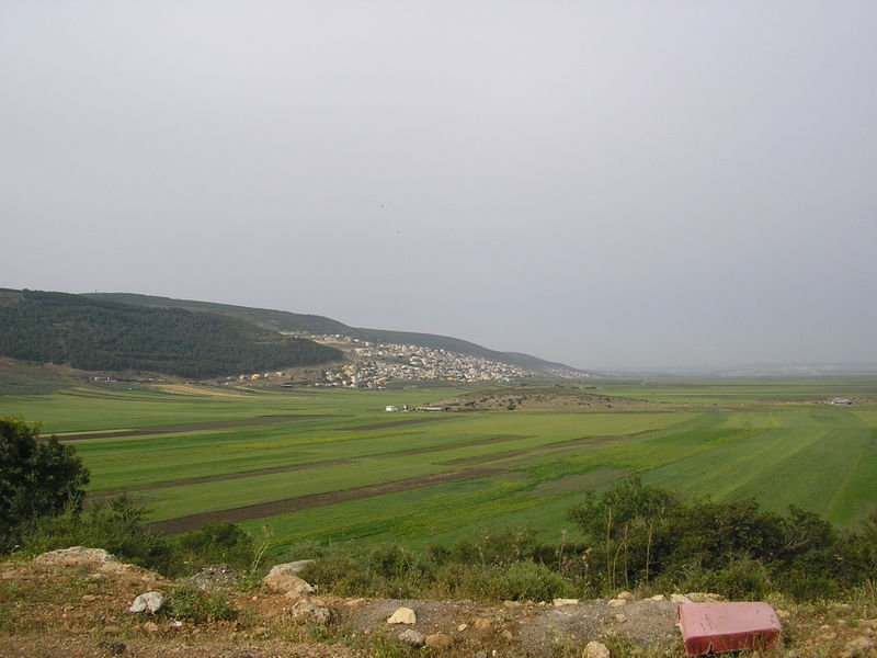 בעיינה נוג'ידאת, מבט מצפון, מעבר לבקעת בית נטופה. צולם על ידי